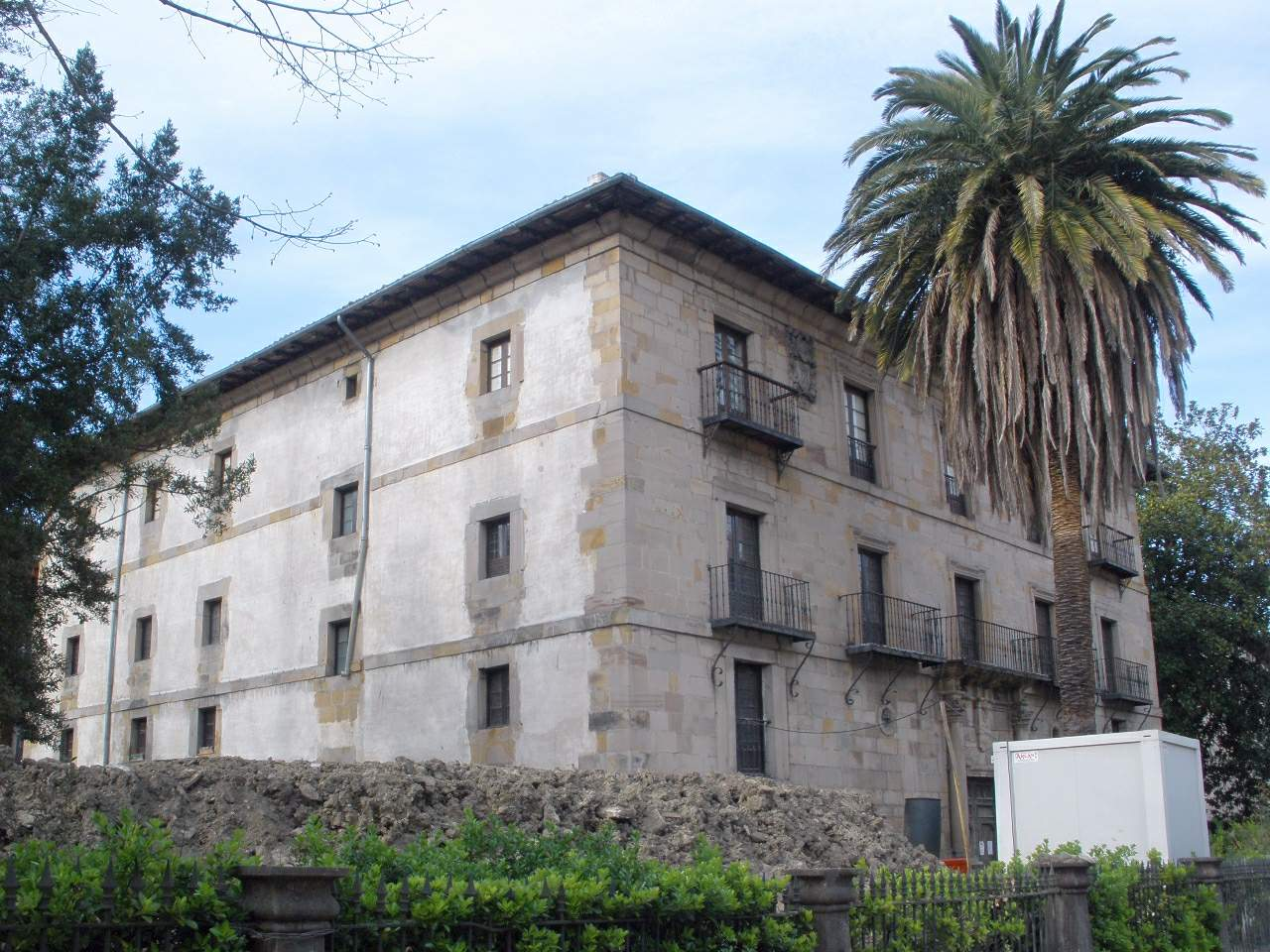 Balmaseda - Palacio de Horcasitas